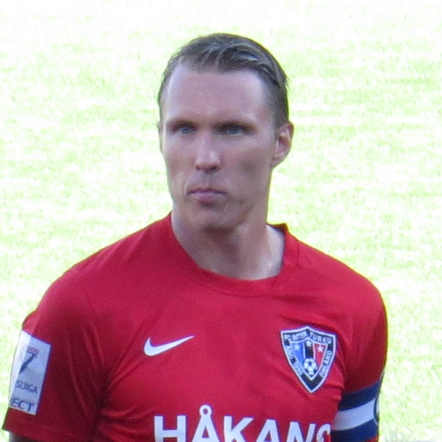 Ari Nyman, suomalainen jalkapalloilija FC Inter Turun joukkueessa kaudella 2015.